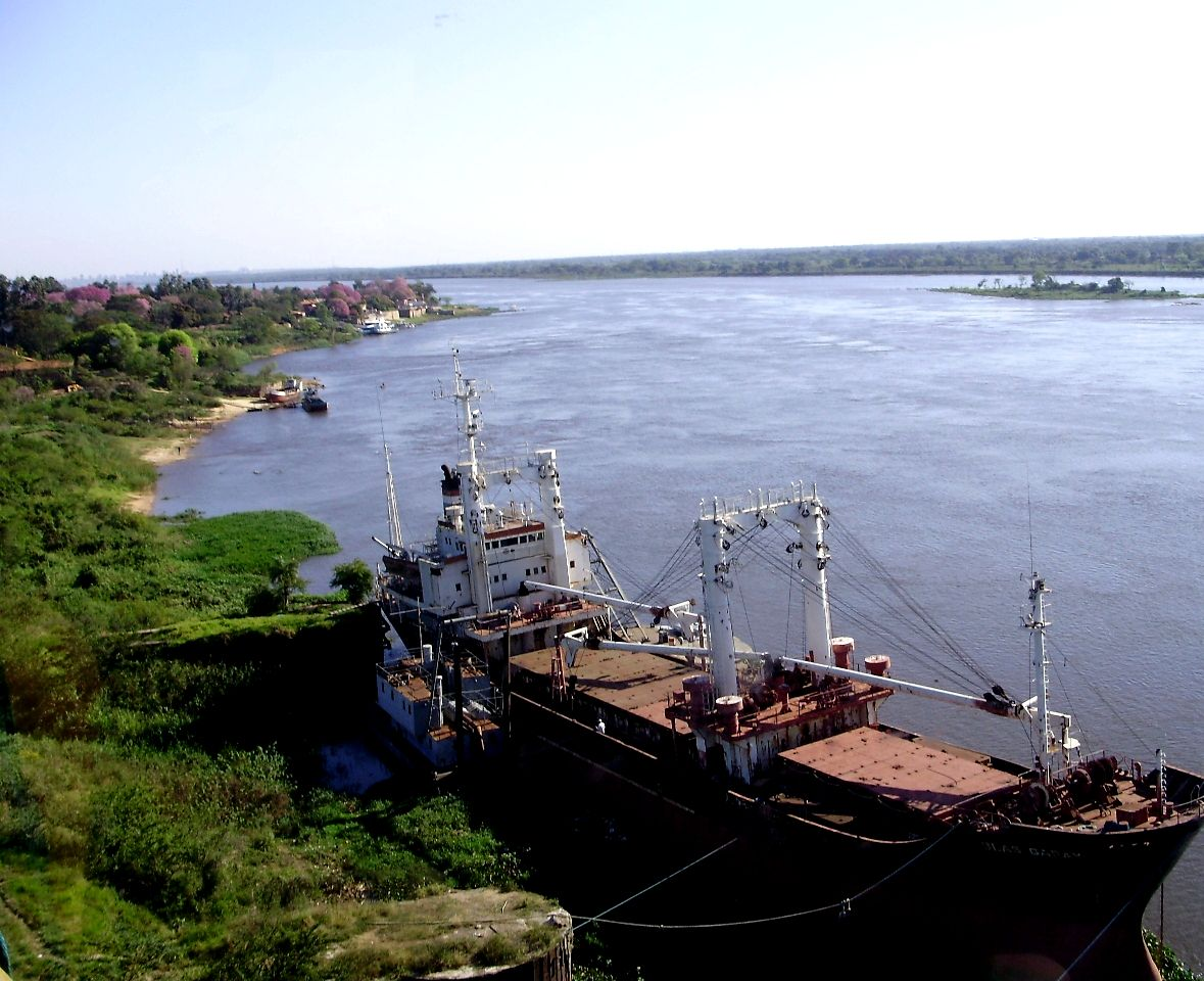 Paraguay